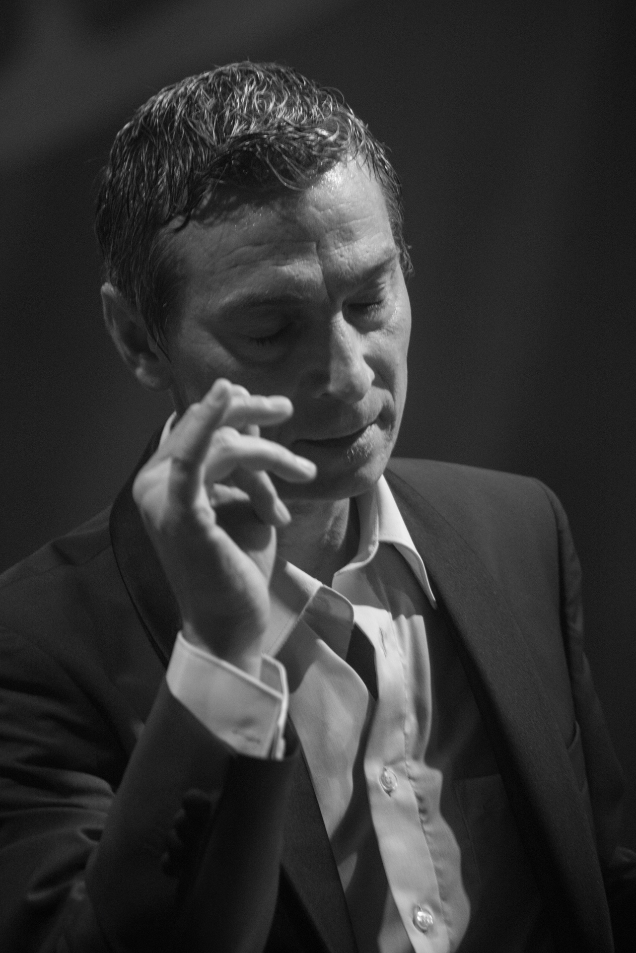 Massimo Savić 2013